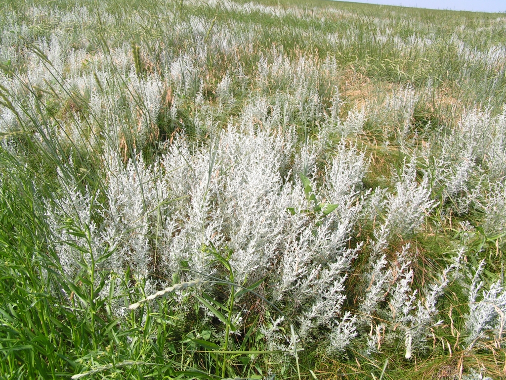 Artemisia Maritima in Saltmarsh near Friedrichskoog, Nationalpark Schleswig-Holsteinisches Wattenmeer, Germany, July 2006